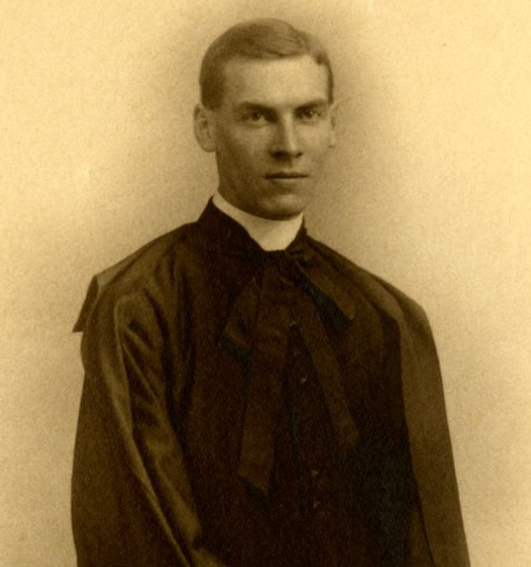 L'abbé Alexandre Vachon (1885-1953). Il deviendra plus tard monseigneur Vachon, archevêque d'Ottawa